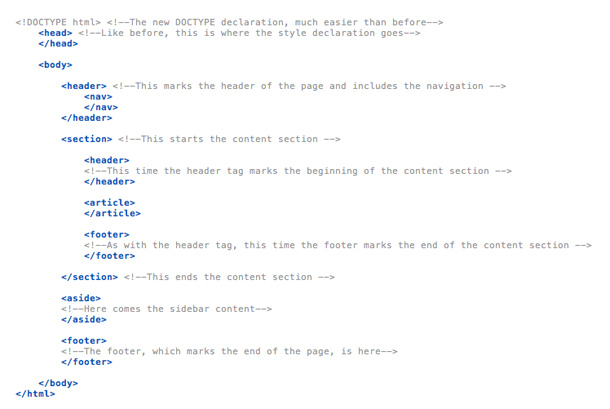 HTML 5